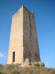 Torre de Espioca, sitada en el término municipal de Picassent.